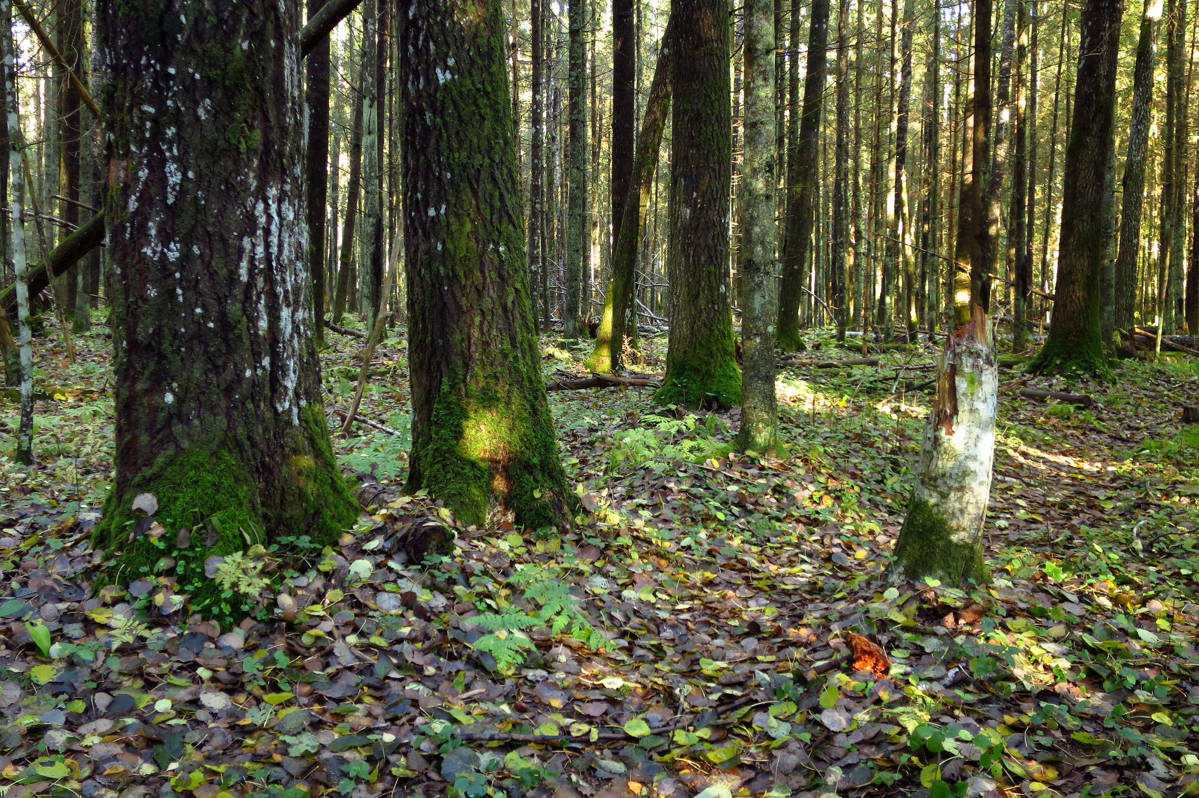 Haavik Saarjõe maastikukaitsealal